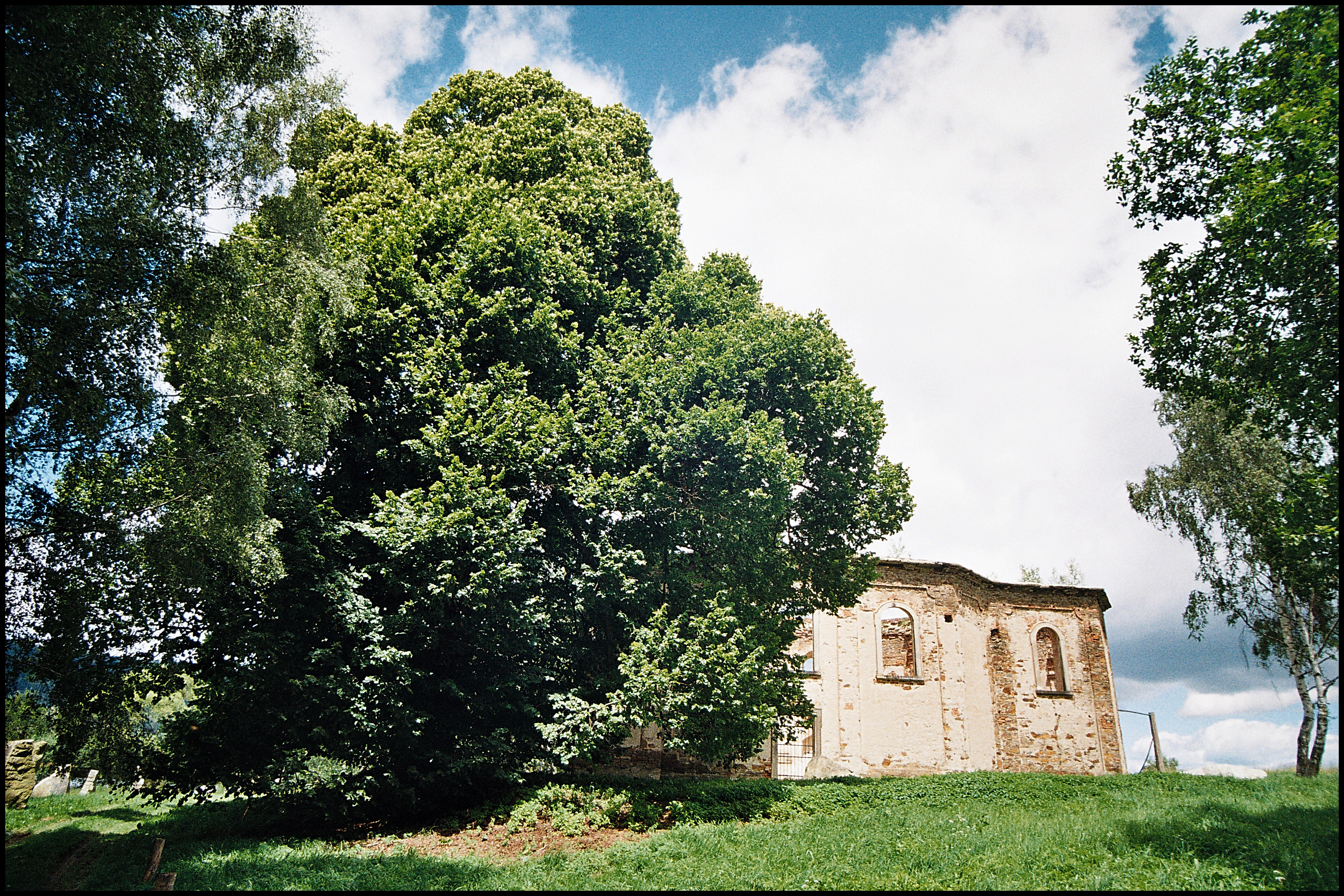 Blažejská lípa u zříceniny kostela sv. Blažeje nedaleko od obce Branišov.